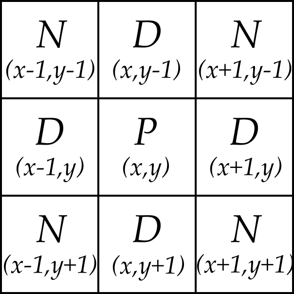 Achter-Nachbarschaft / 8-Nachbarschaft um den Mittelpunkt P 8-neighbourhood around the centre P